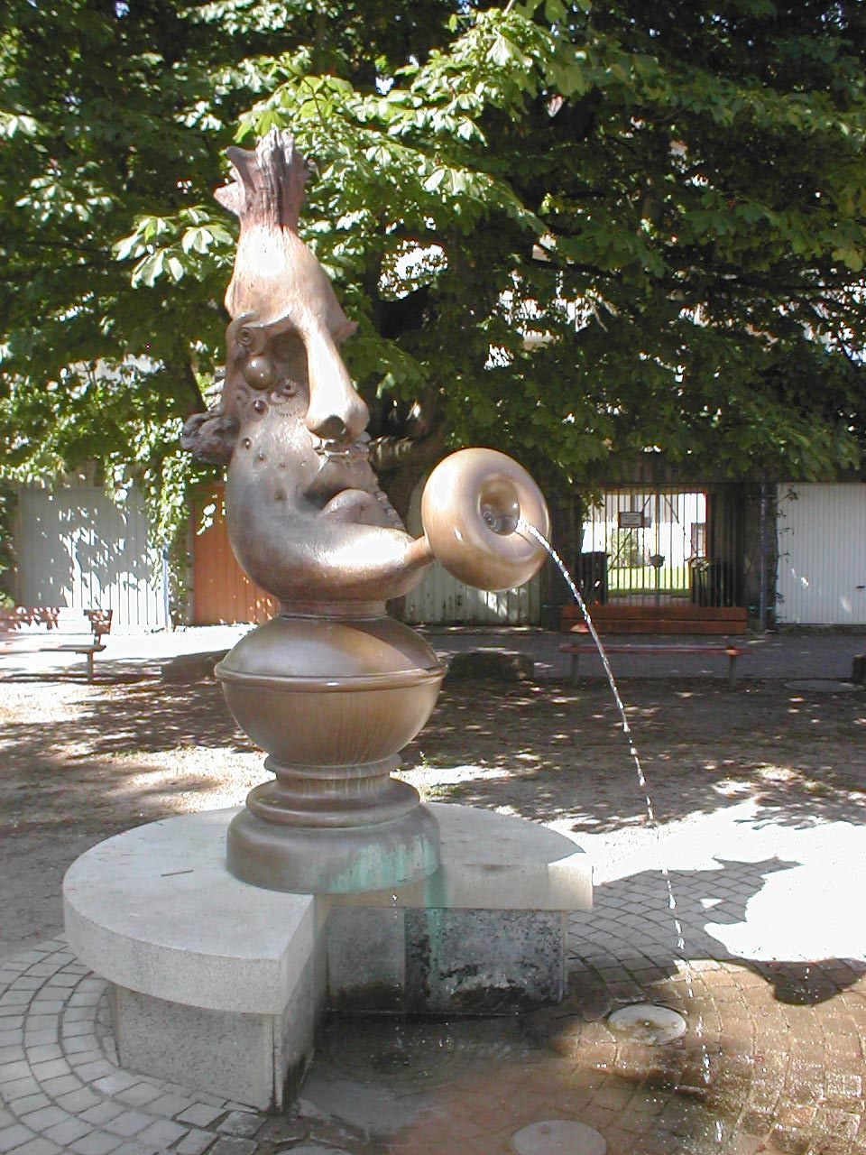 Mondbrunnen von Jürgen Goertz 1997 im Kirchhöfle hinter der Nicolaikirche in Heilbronn